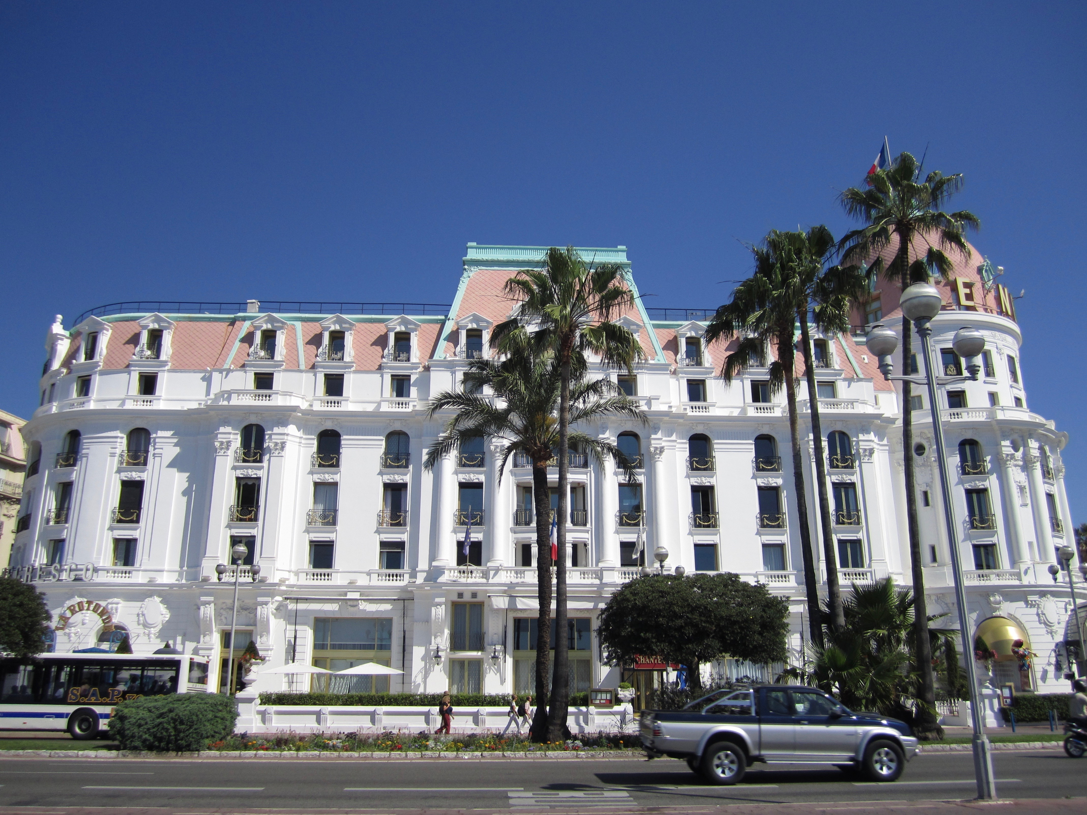 Hôtel Le Negresco à Nice situé sur la promenade des Anglais.